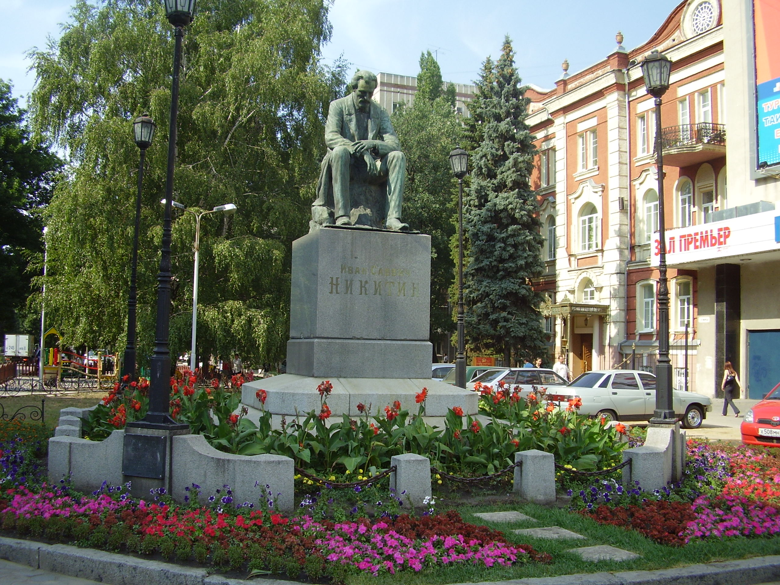 Воронеж,памятник И.С.Никитину у кинотеатра "Пролетарий" (Никитинская площадь)